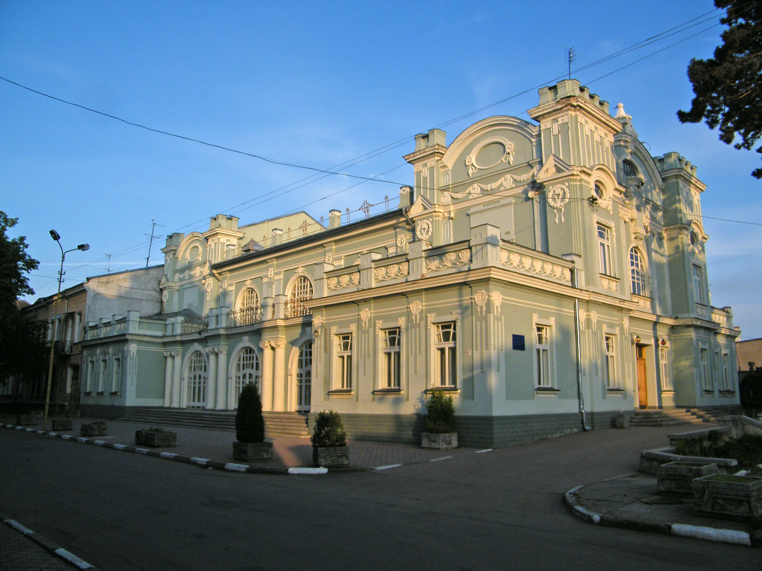 Міський Будинок культури в Стрию